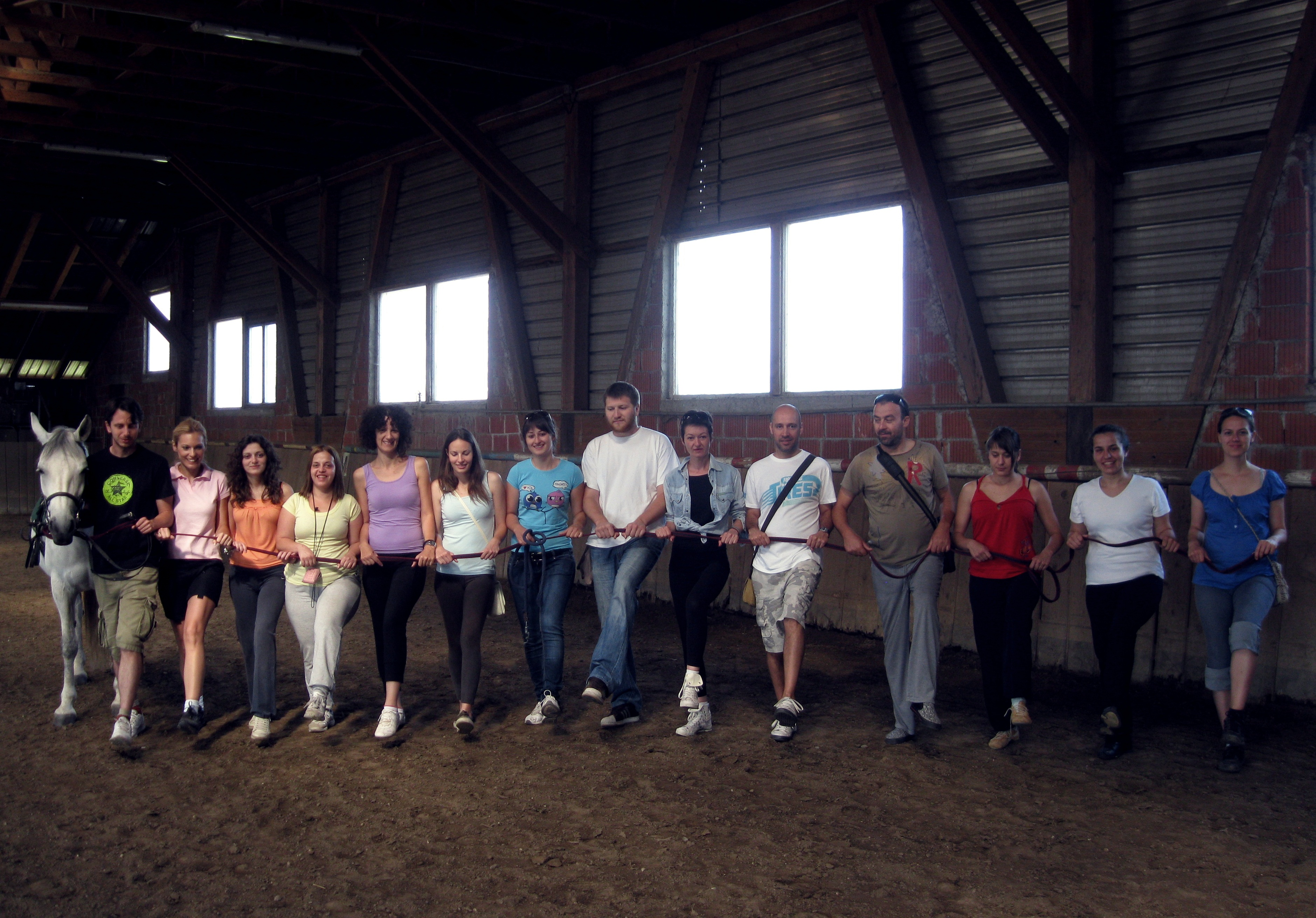 Активности уз помоћ коња